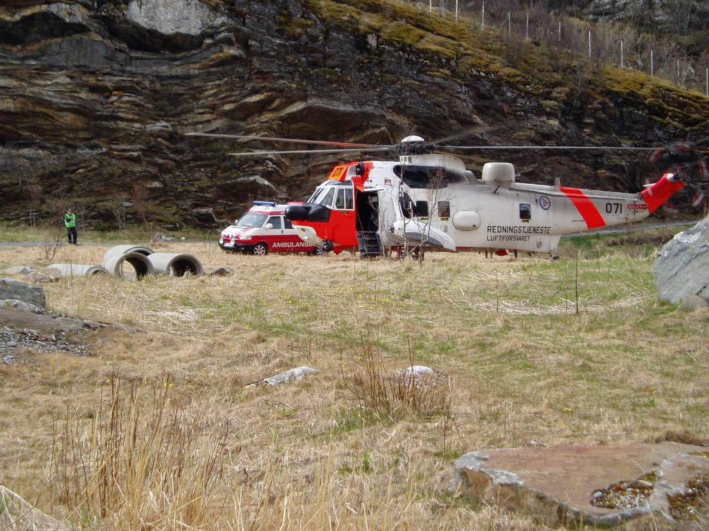 redningstjeneste luftforsvaret 071 Seaking redningshelikopter på oppdrag i Bodø (Foto: Mount73)